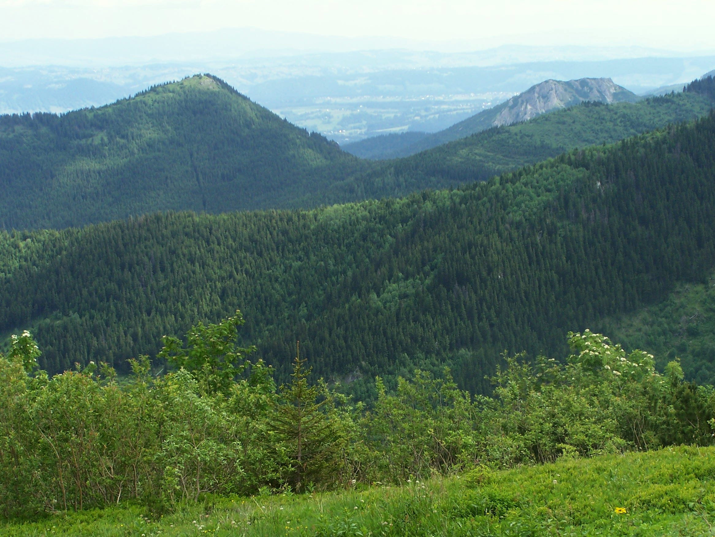 Łysanki, Sarnia Skała (West Tatra Mountains)